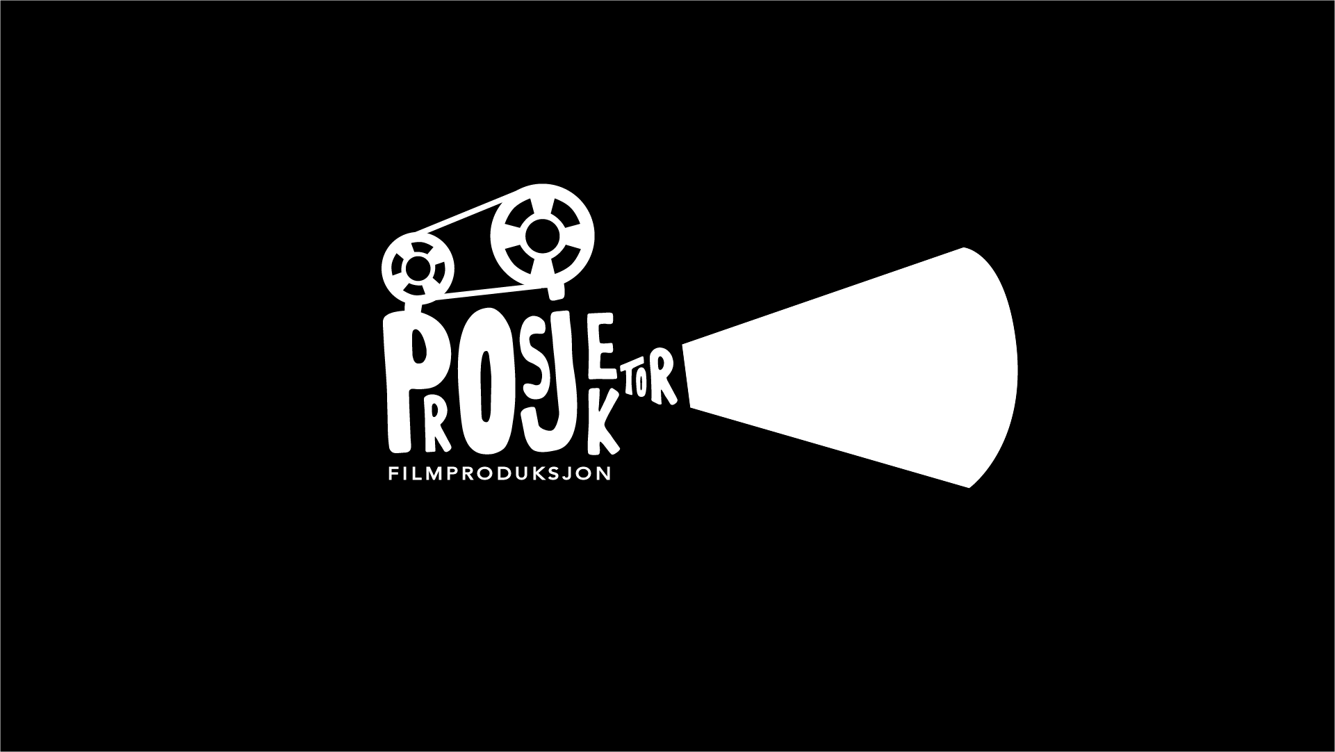 Logoen til organisasjonen Prosjektor Filmproduksjon